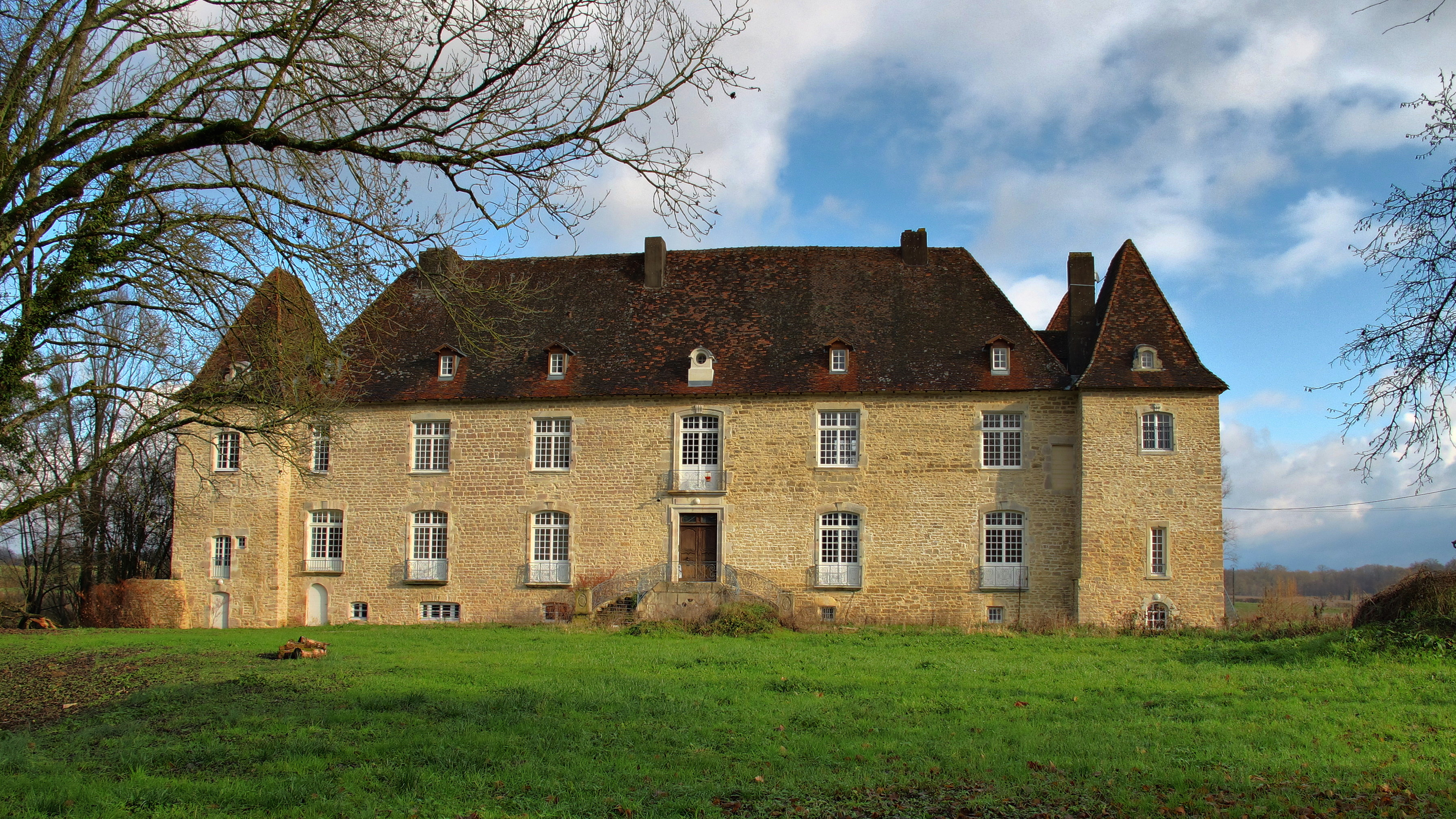 Inscrit aux monuments historiques sous le numéro : PA00101715